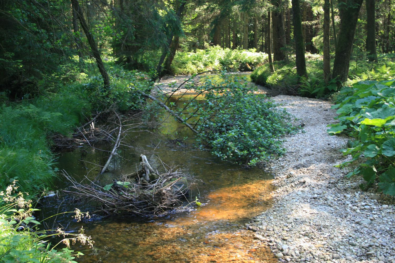 Österreich/Austria/Autriche: Oberösterreich, Hausruckviertel, Redlbach ca. 2.1 km S Forsthaus Redltal, ca. 570 m s.m.